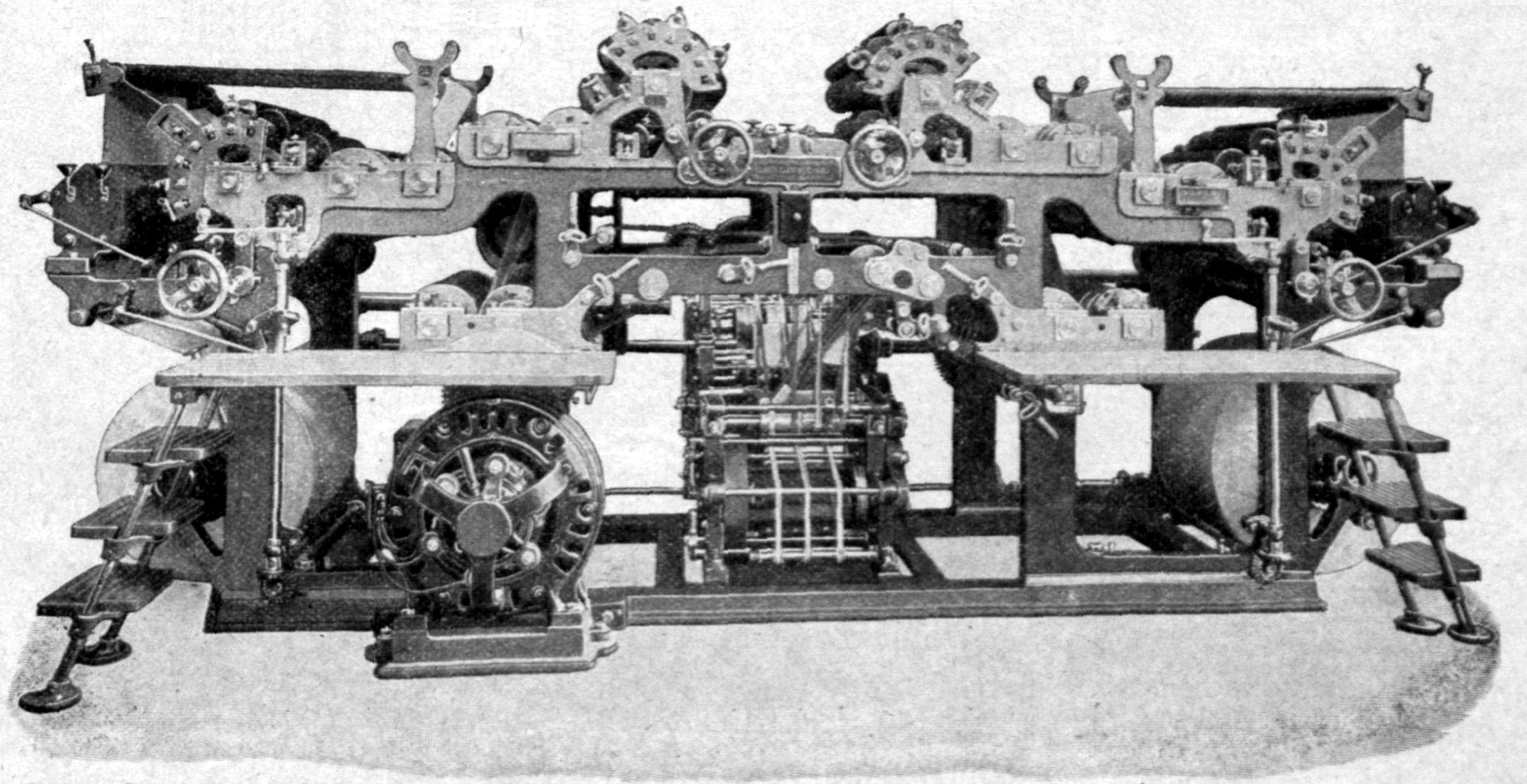 Zweifache Rotationsmaschine erbaut für die Lübeckischen Anzeigen von der Schnellpressenfabrik Frankenthal Albert & Co., Akt. Ges. in Frankenthal